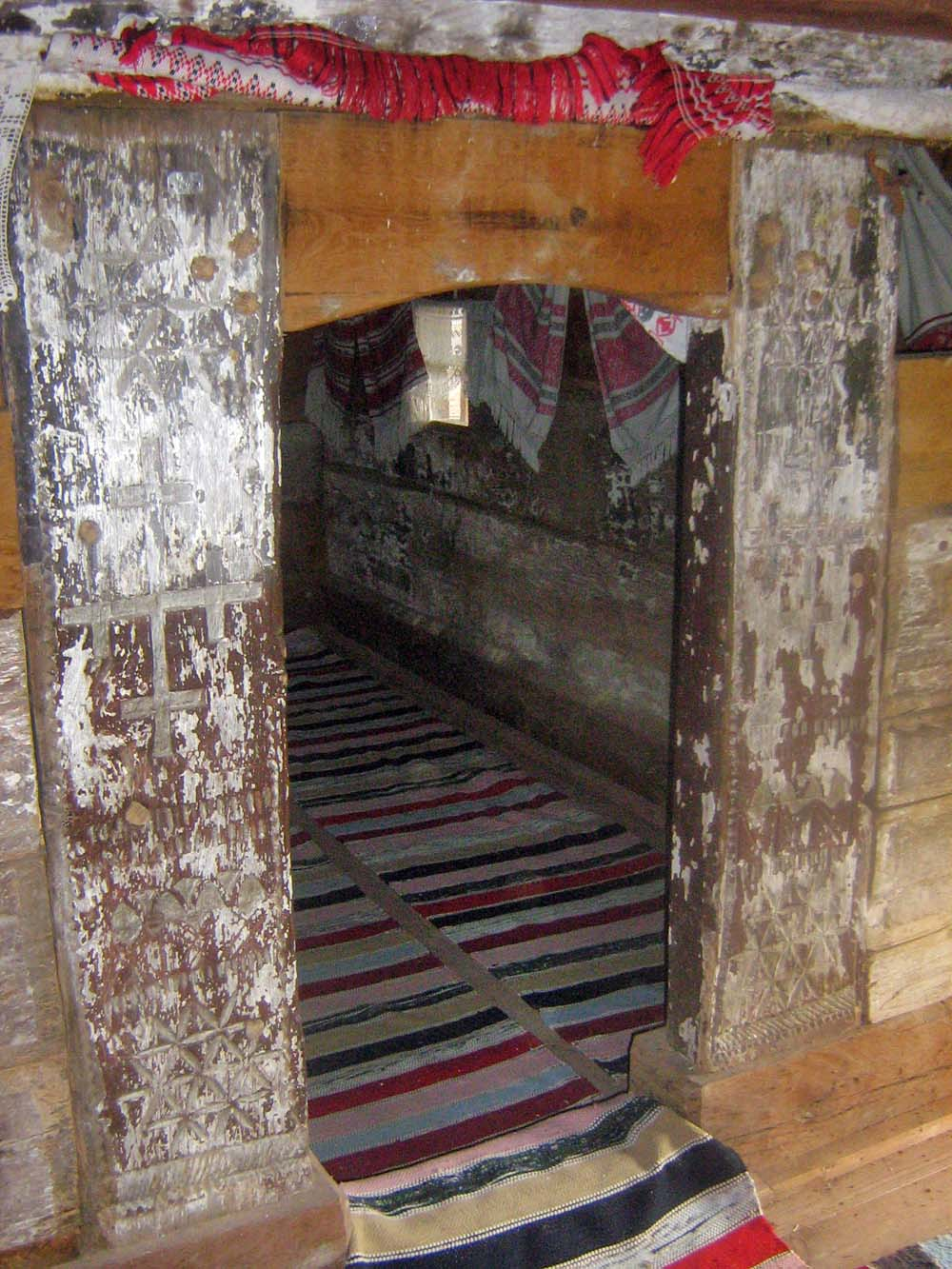 Biserica de lemn din Prodăneşti, Sălaj. Intrarea în navă, din pronaos. Foto: Mihai Petriş, 12 decembrie 2007.